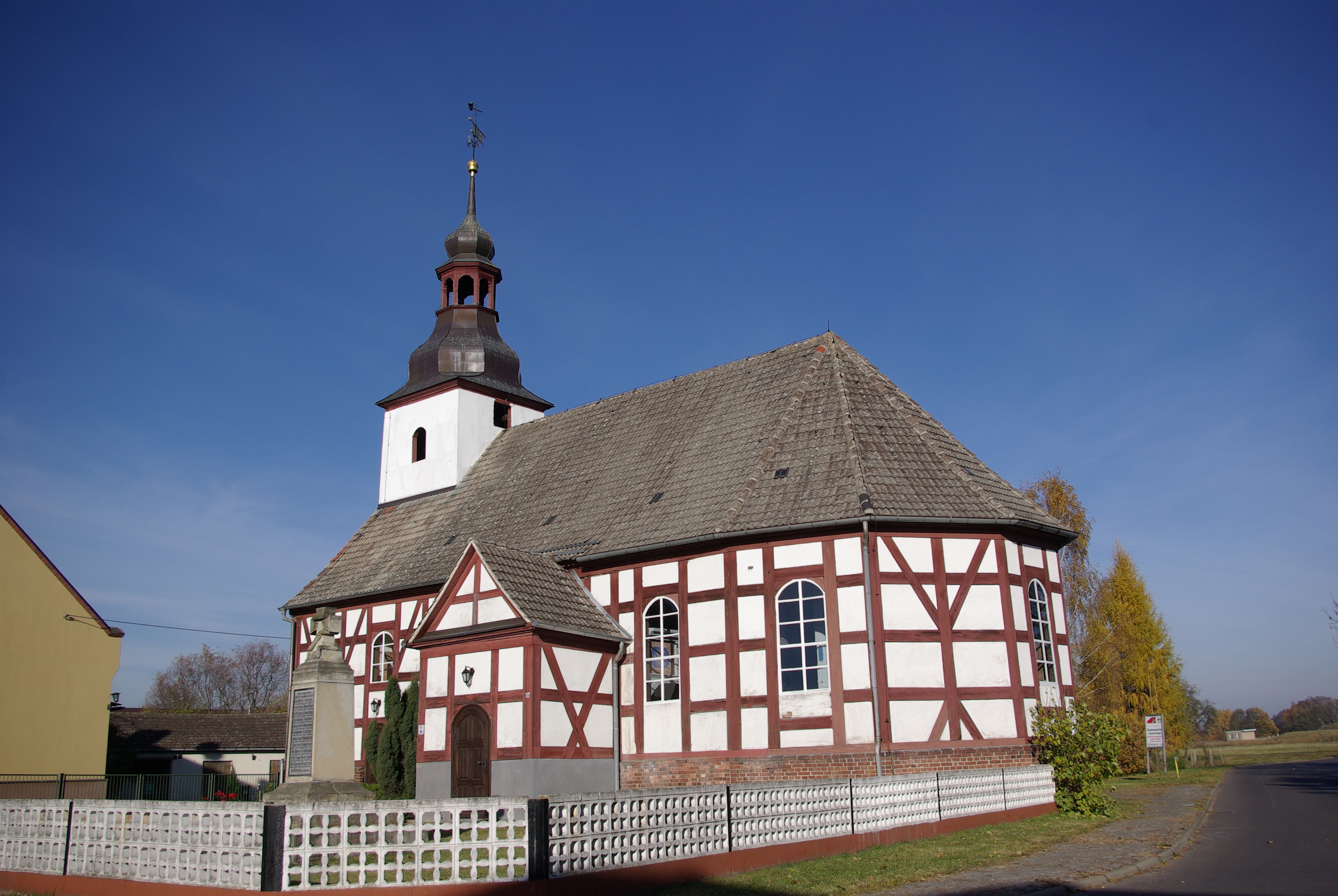 Bersteland Ortsteil Niewitz in Brandenburg. Die Kirche wurde um 1770 erbaut und steht unter Denkmalschutz.